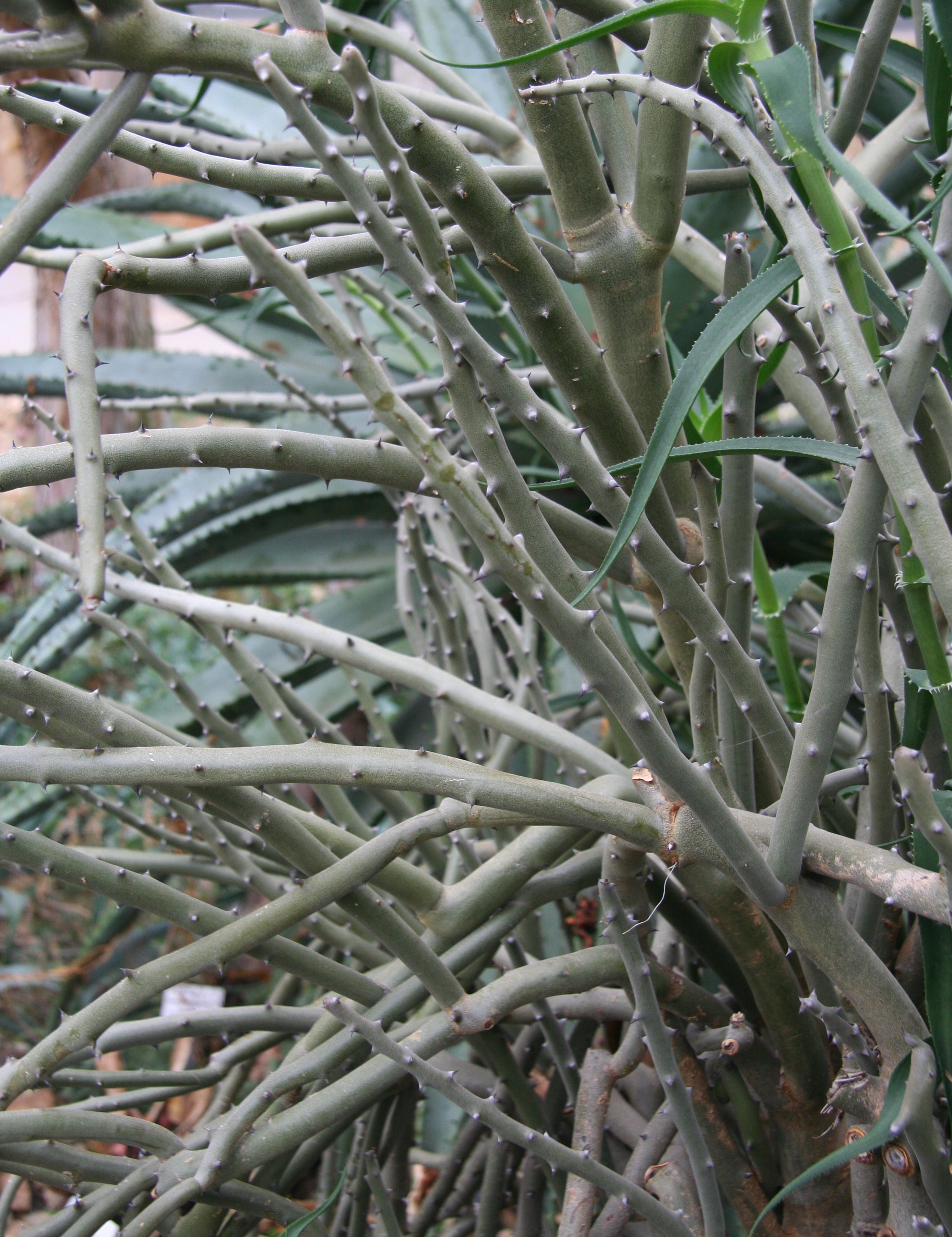 Alluaudia dumosa im Botanischen Garten Dresden